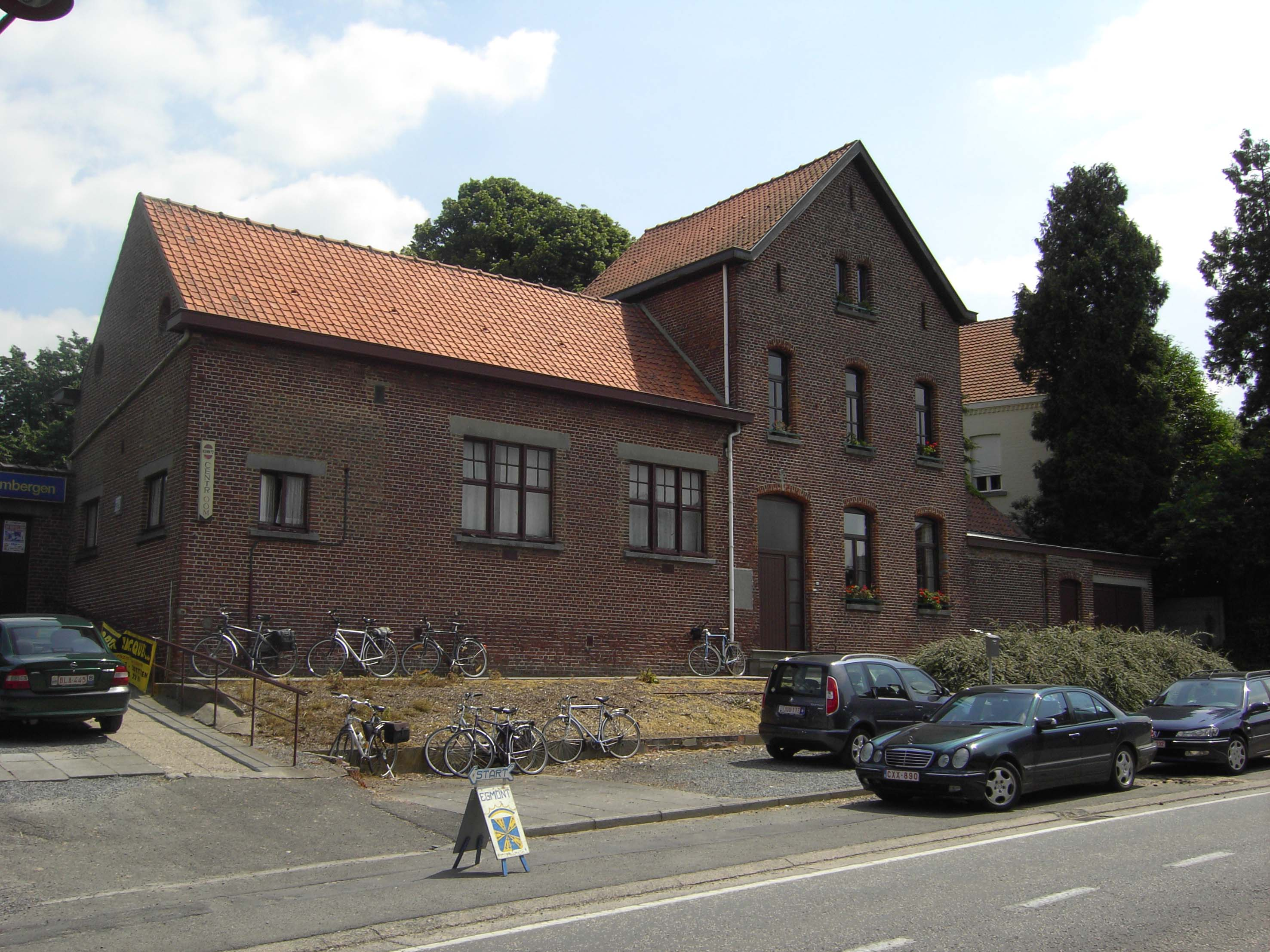 Het voormalige gemeentehuis - Oombergenstraat - Oombergen - Zottegem - Oost-Vlaanderen - België